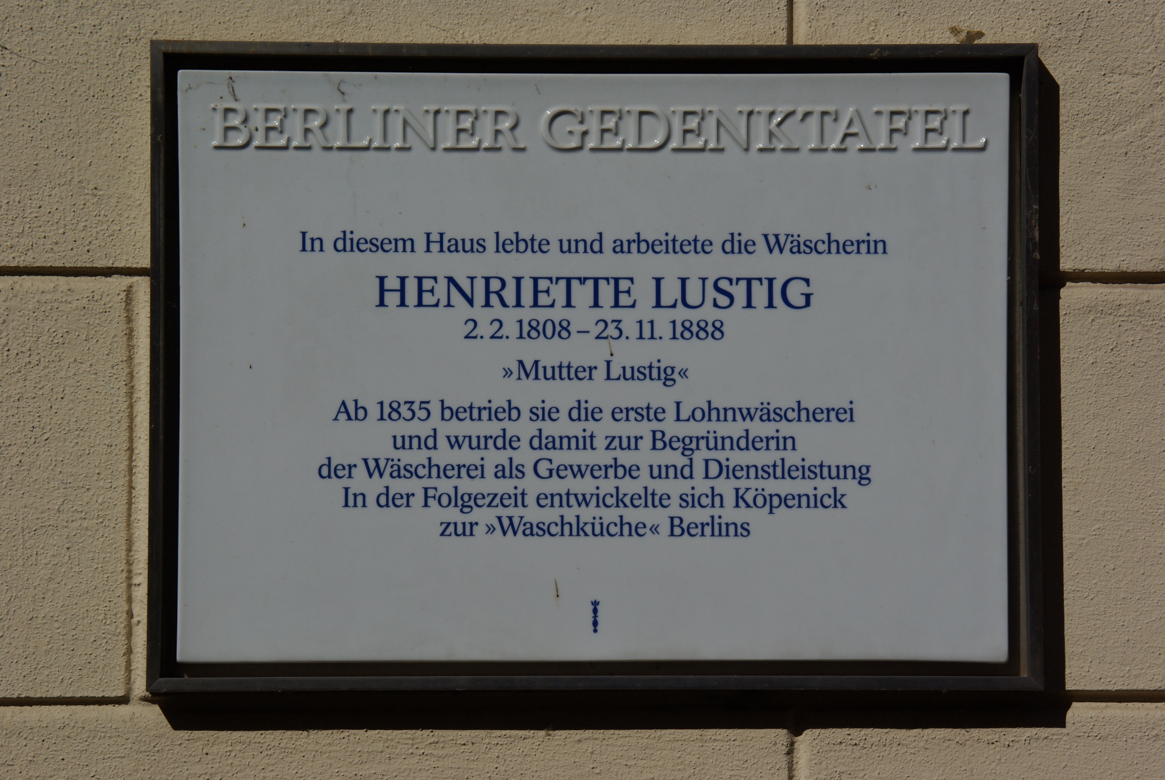 Berlin, Deutschland, Köpenick, Alter Markt 4, Gedenktafel für Henriette Lustig, Geotags in Exif-Daten